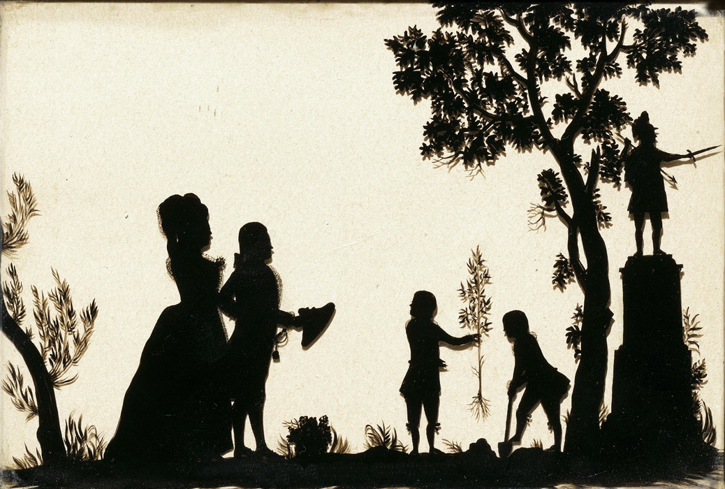 Неизвестный художник. Император Павел I и императрица Мария Федоровна с детьми, великими князьями Александром (будущим императором) и Константином. Конец XVIII - начала XIX в. Стекло, тушь. Размер 11 х 16,5 см. Копия с силуэта И. Ф. Антинга. Аналогичная работа хранится в собрании Ю.Вейцмана, Мюнхен. Выставки: «Павел I – эпоха и личность. Утраченные иллюзии» (Государственный музей-заповедник «Царицыно», 2011, кат. № 81).